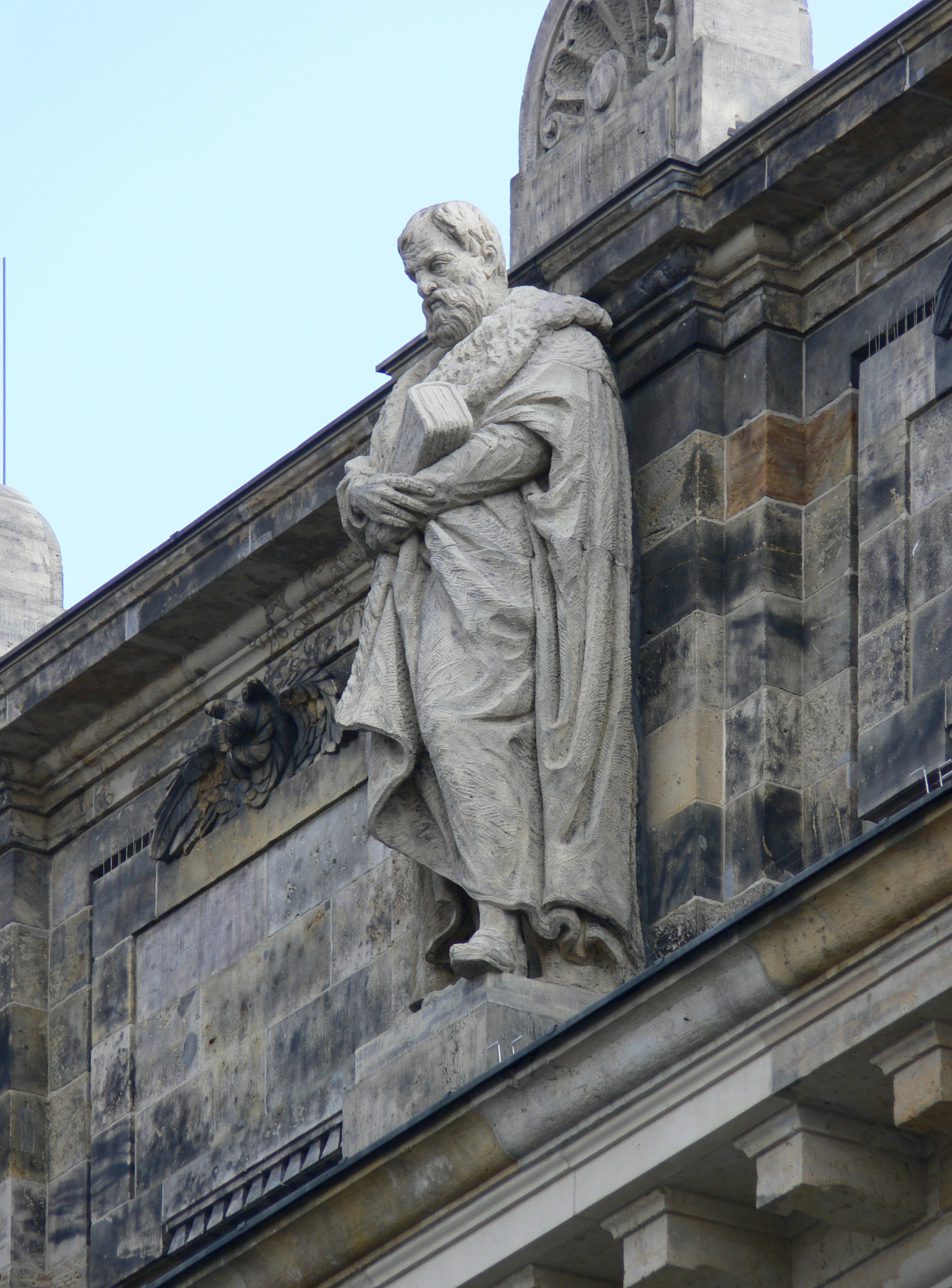 Leipzig, Reichsgerichtsgebäude Statue "Johann von Schwarzenberg"